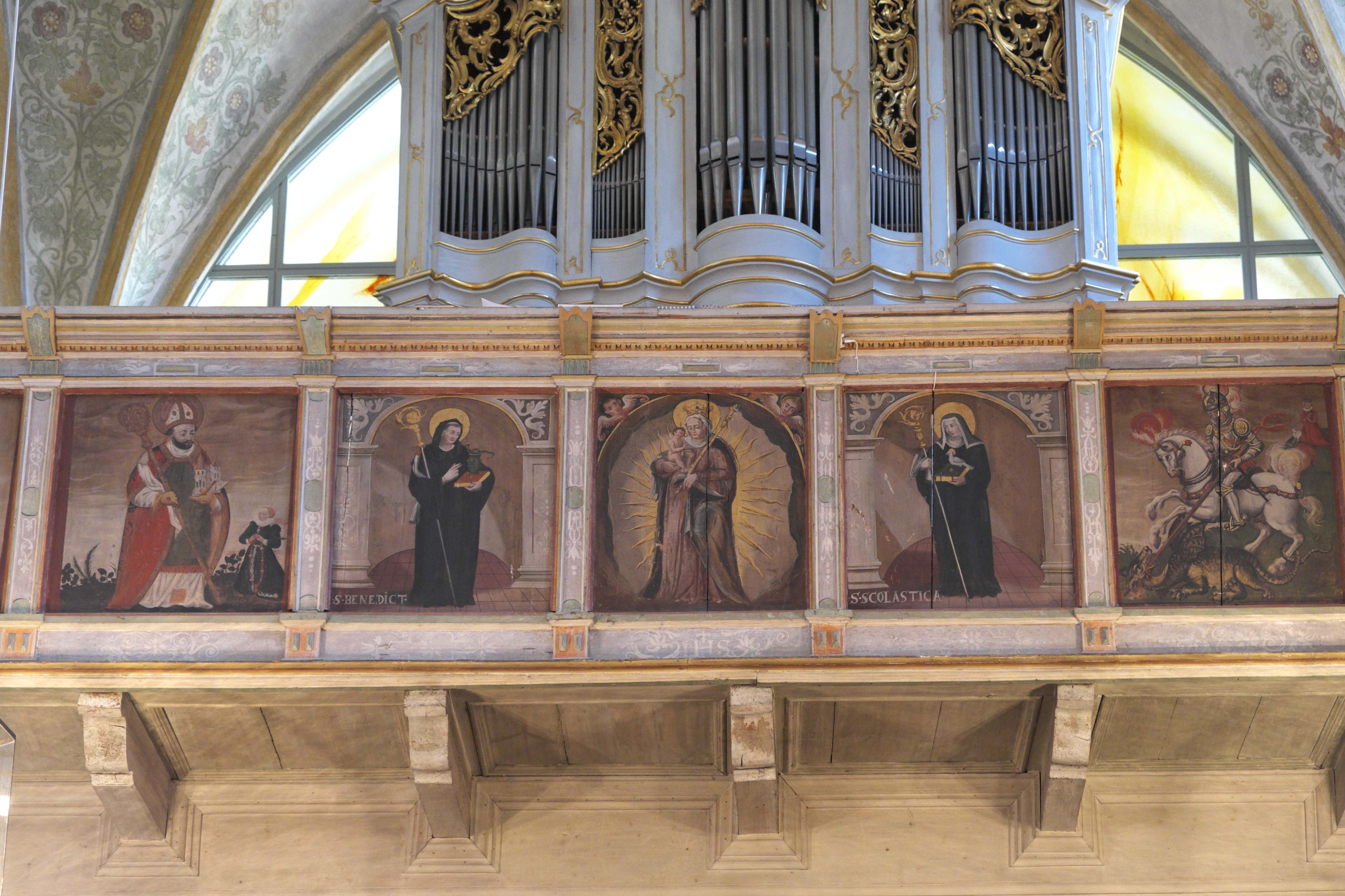 Katholische Abtei- und Kuratiekirche Mariä Opferung des Benediktinerinnenklosters Frauenchiemsee auf der Fraueninsel im Landkreis Rosenheim (Bayern/Deutschland), Empore; Darstellung: Bischof Virgil von Salzburg mit einer Stifterin, Benedikt von Nursia, Madonna mit Kind, heilige Scholastika, heiliger Georg im Kampf mit dem Drachen